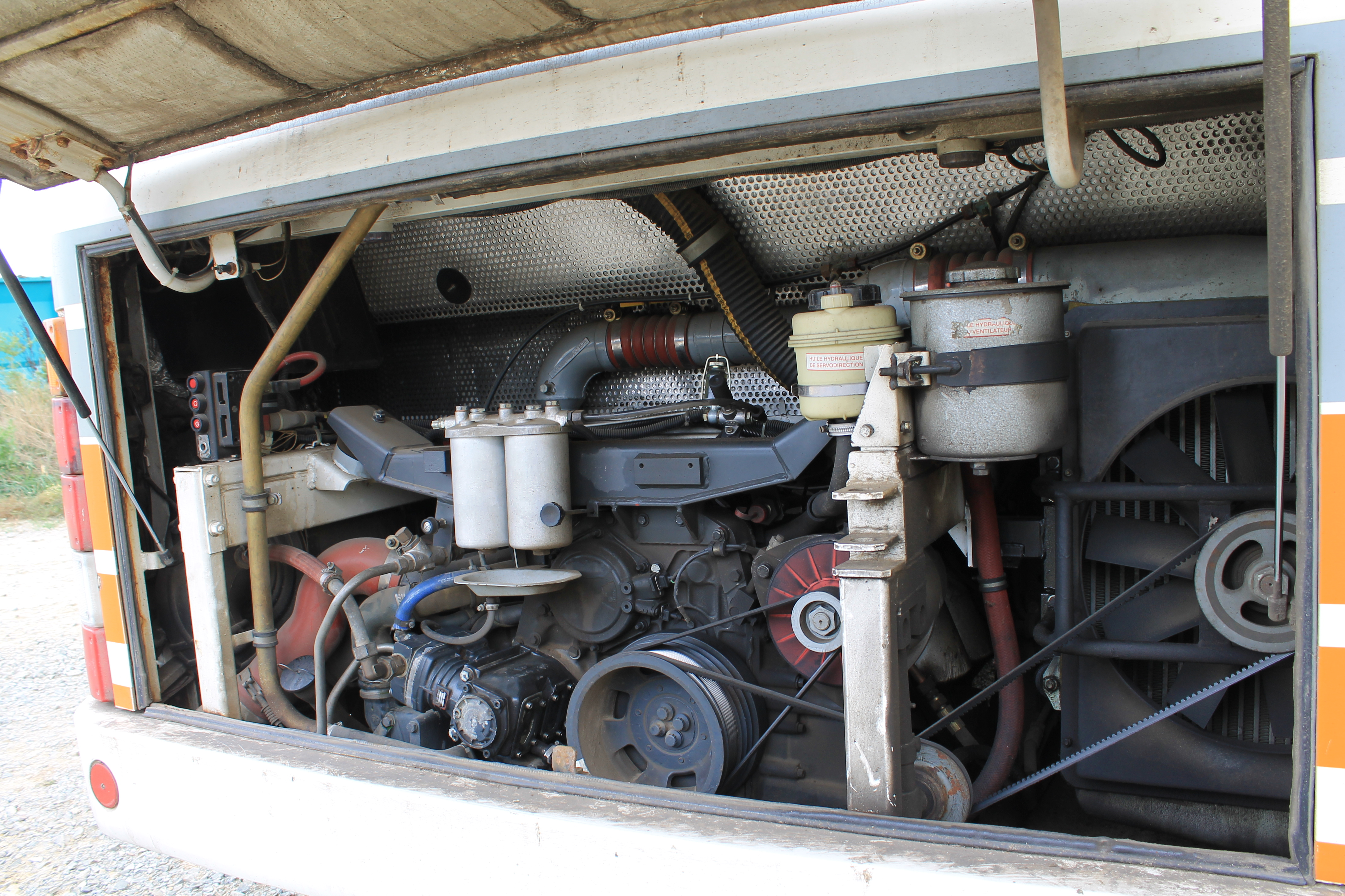 Moteur